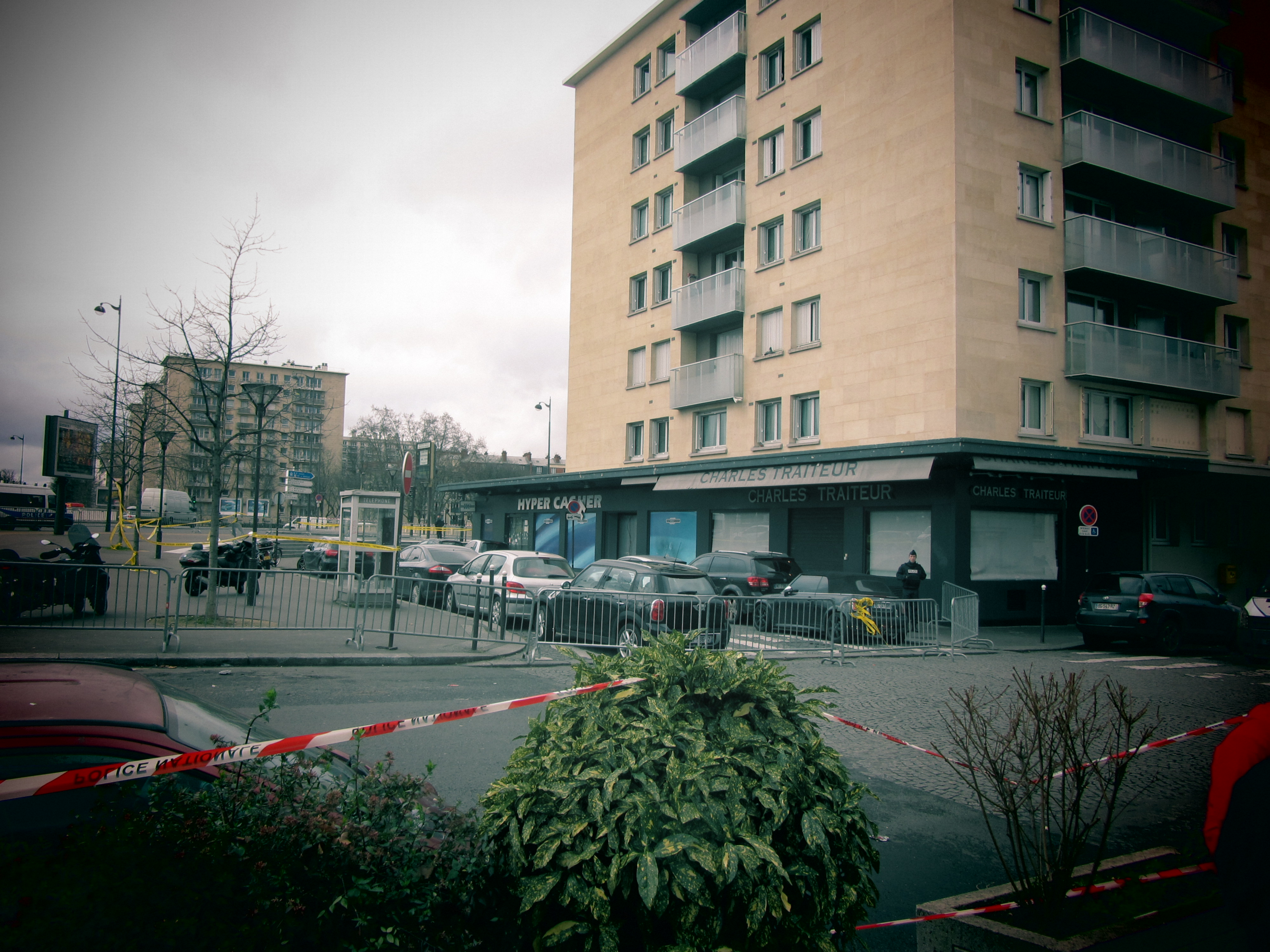 Le magasin Hyper Cacher, porte de Vincennes à Paris, au lendemain de la prise d'otages